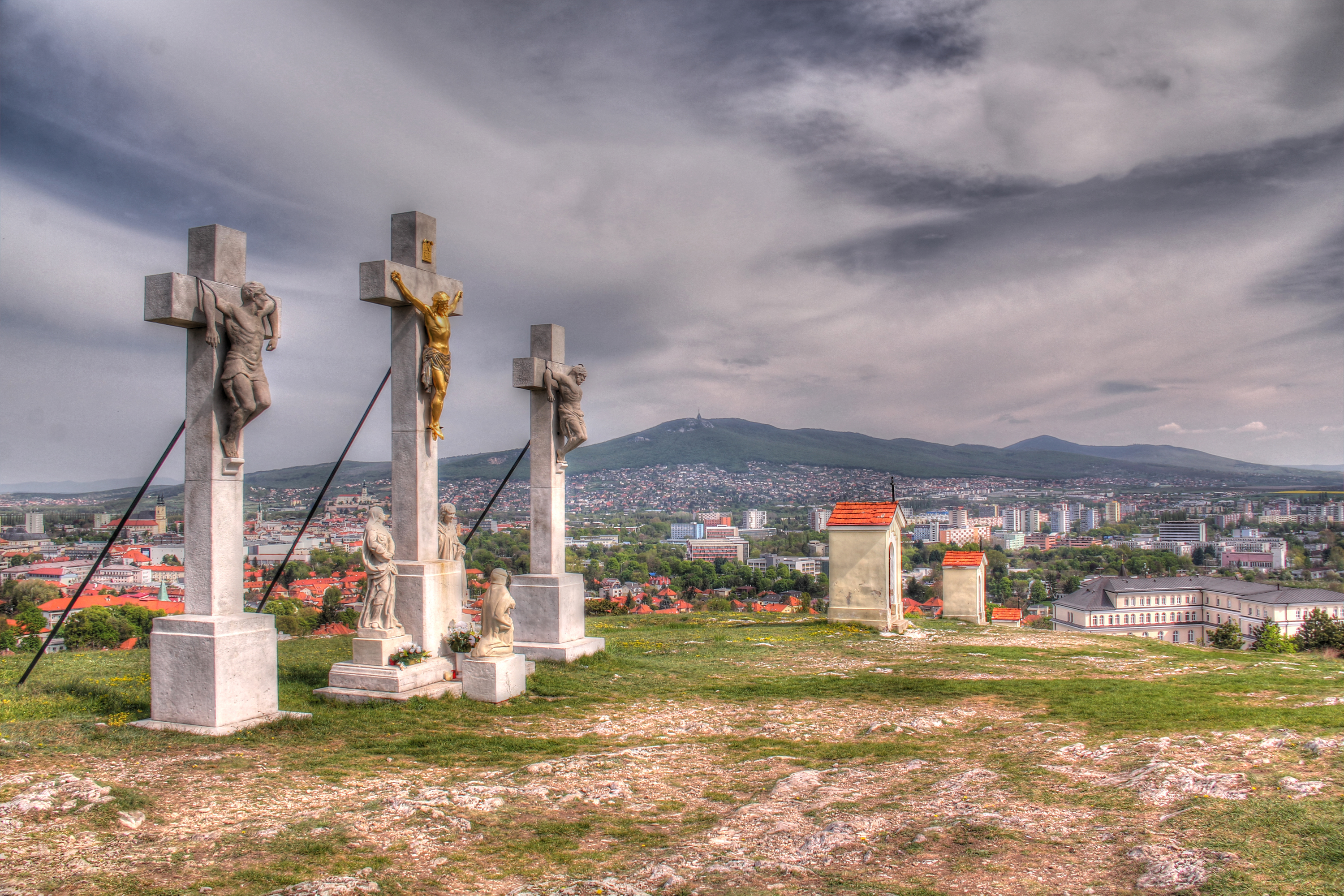 pohľad z nitrianskej kalvárii na mesto Nitra